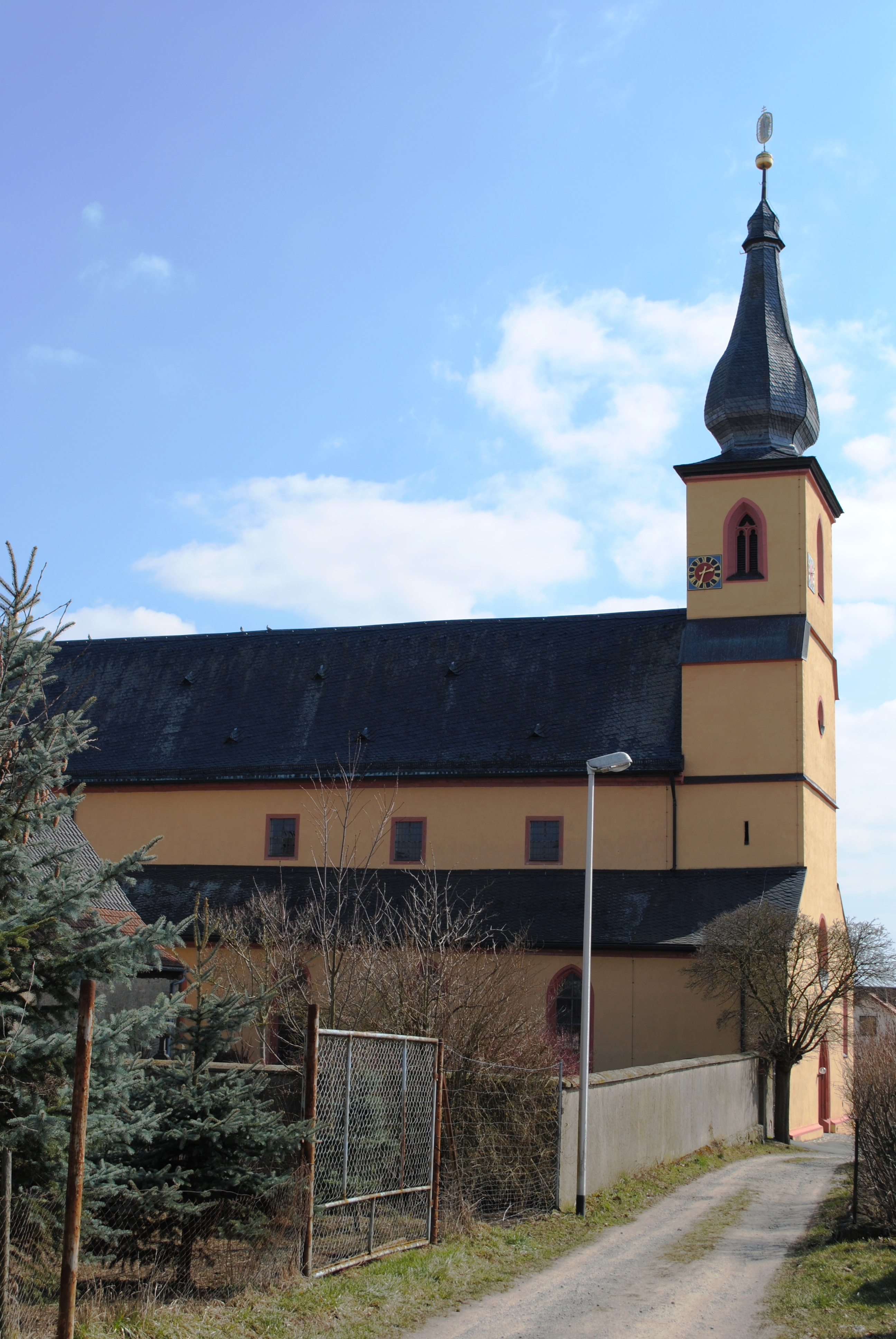 Kirche Dimbach, Volkach, Anlage